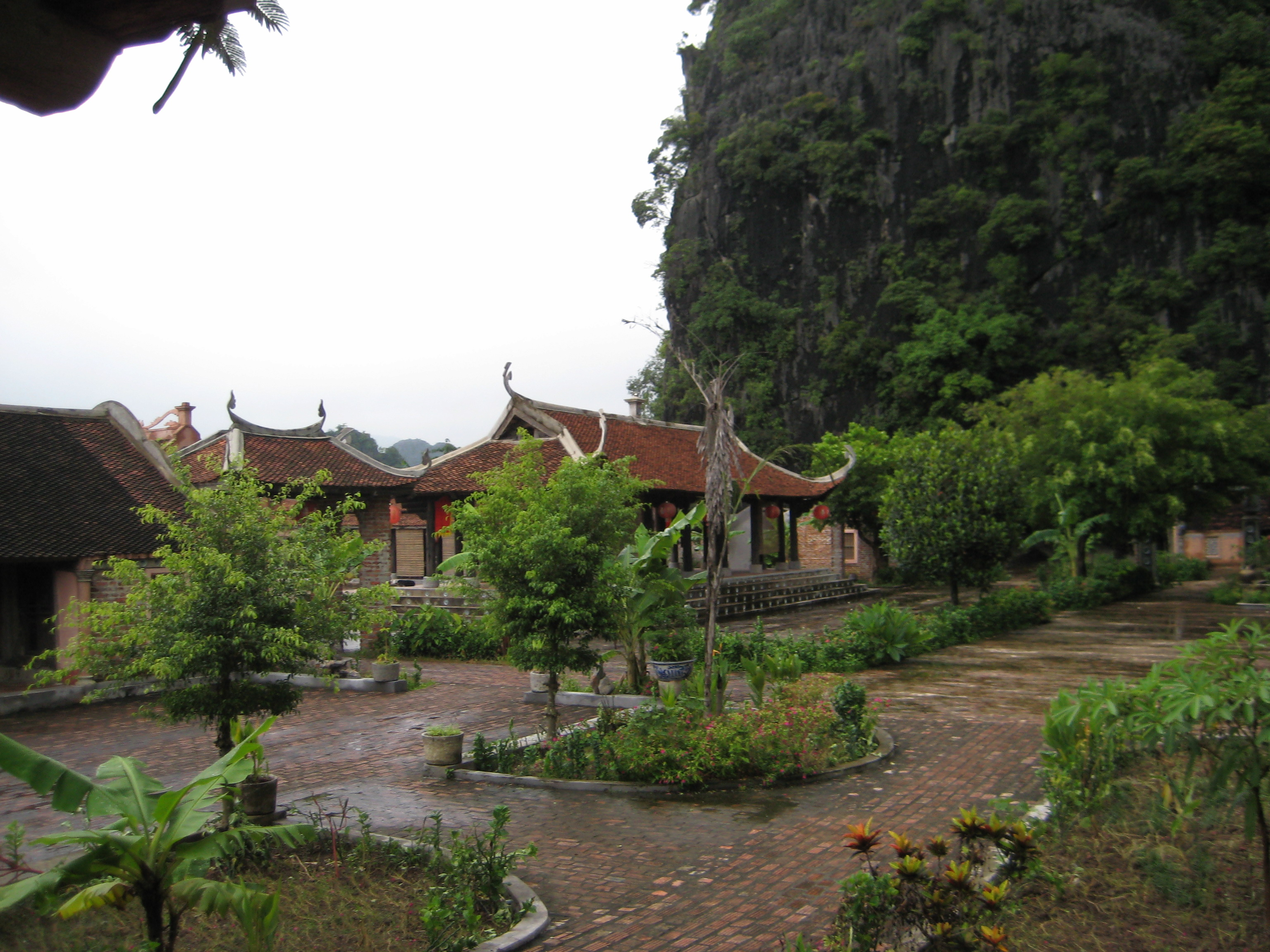 Cố Viên Lầu ở Tam Cốc